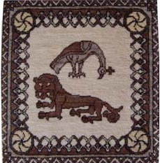 репродукция армянского ковра XIV века